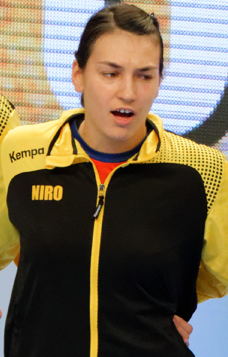 Cristina Neagu, romanian handball player